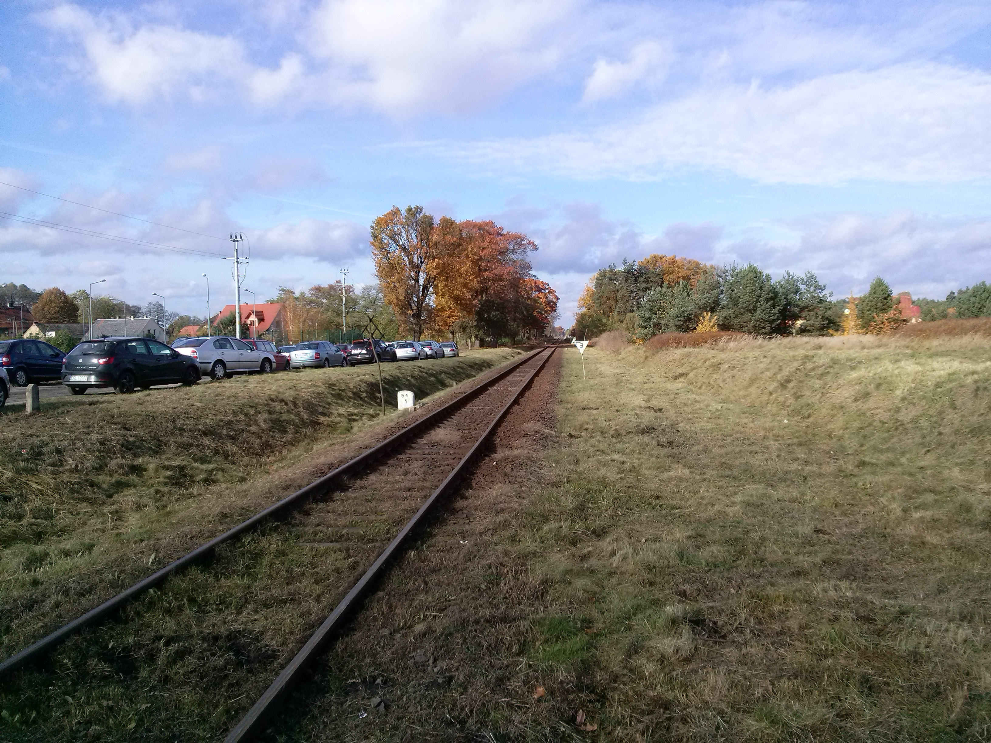 Stary Węgliniec - widok na linię kolejową w kierunku Ruszowa (obok cmentarza komunalnego)